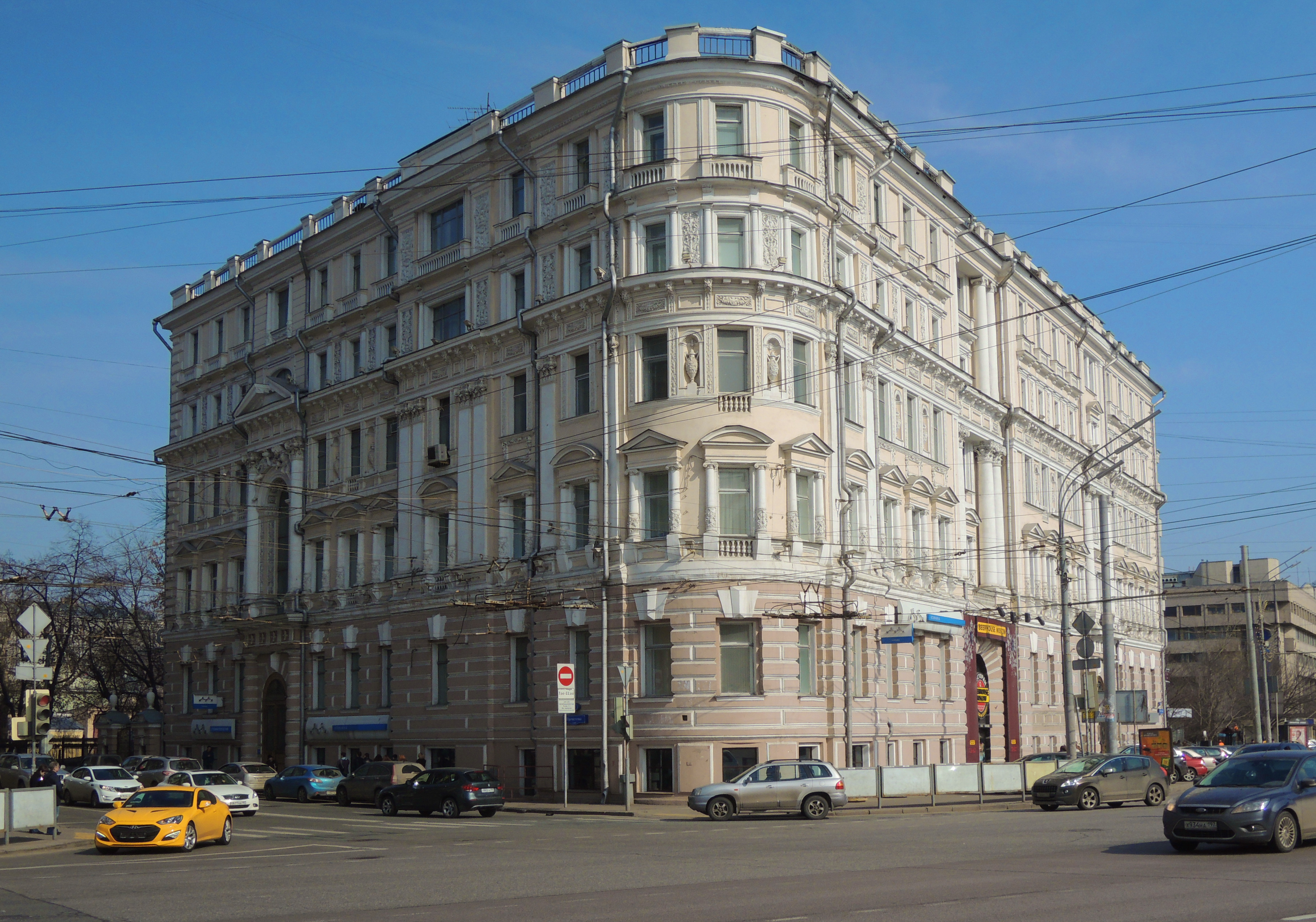 Zubovsky Boulevard